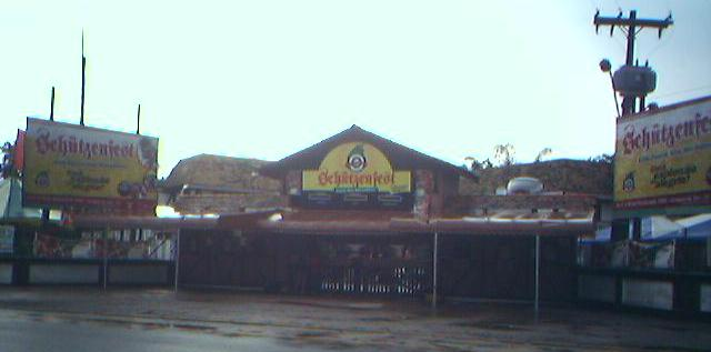 Schützenfest's festival in Jaraguá do Sul, Brazil (2005)